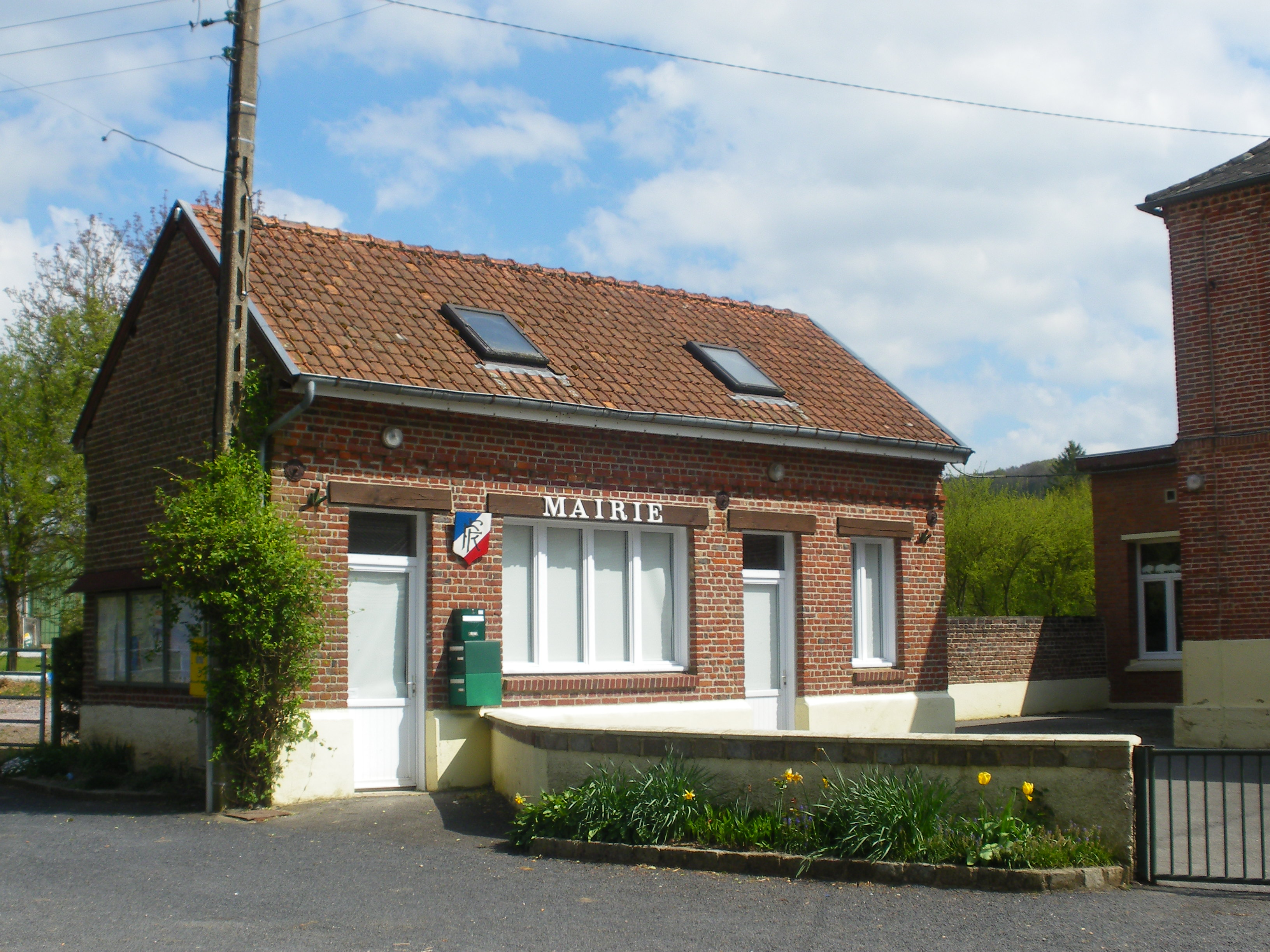 Vue de la mairie de Rebreuve-sur-Canche.